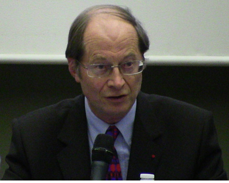 Christian Marbach discute de l'oeuvre de Georges Besse le 14 novembre 2011